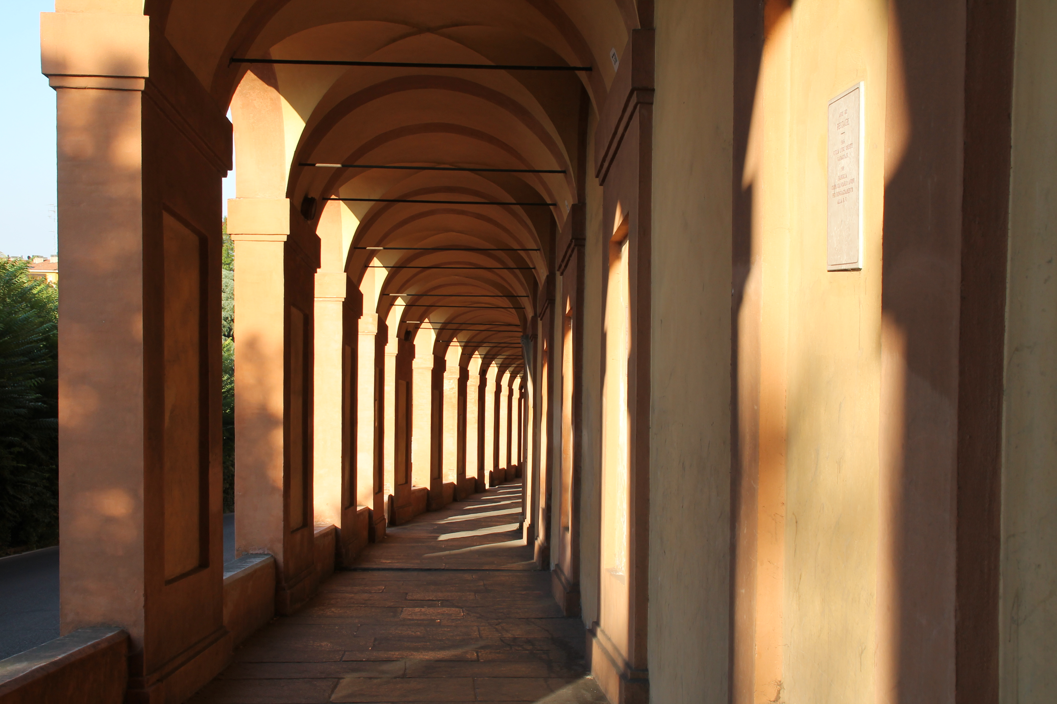 Il portico di San Luca, Bologna This is a photo of a monument which is part of cultural heritage of Italy.